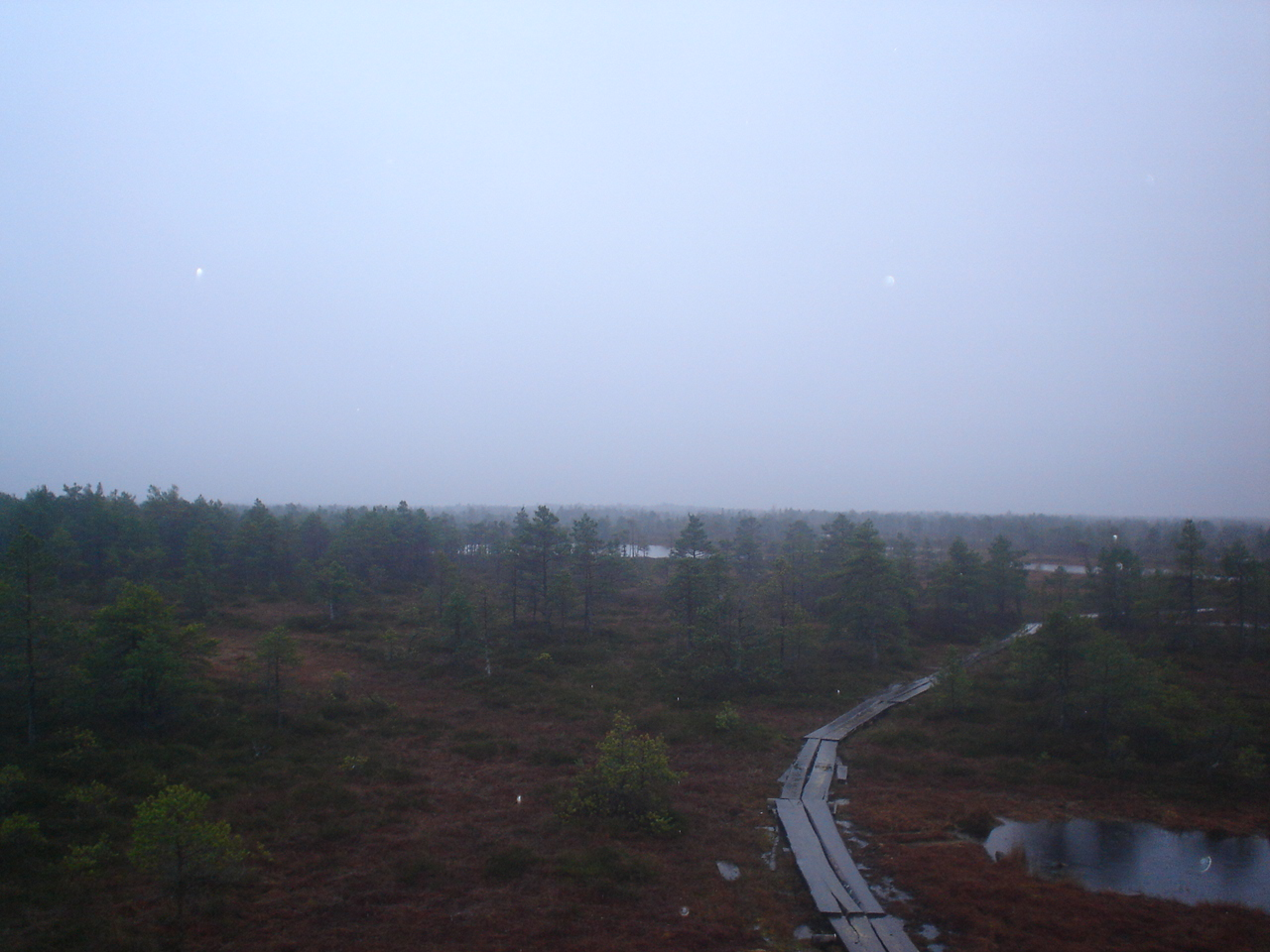 Ķemeru tīrelis. Skats no skatu torņa.